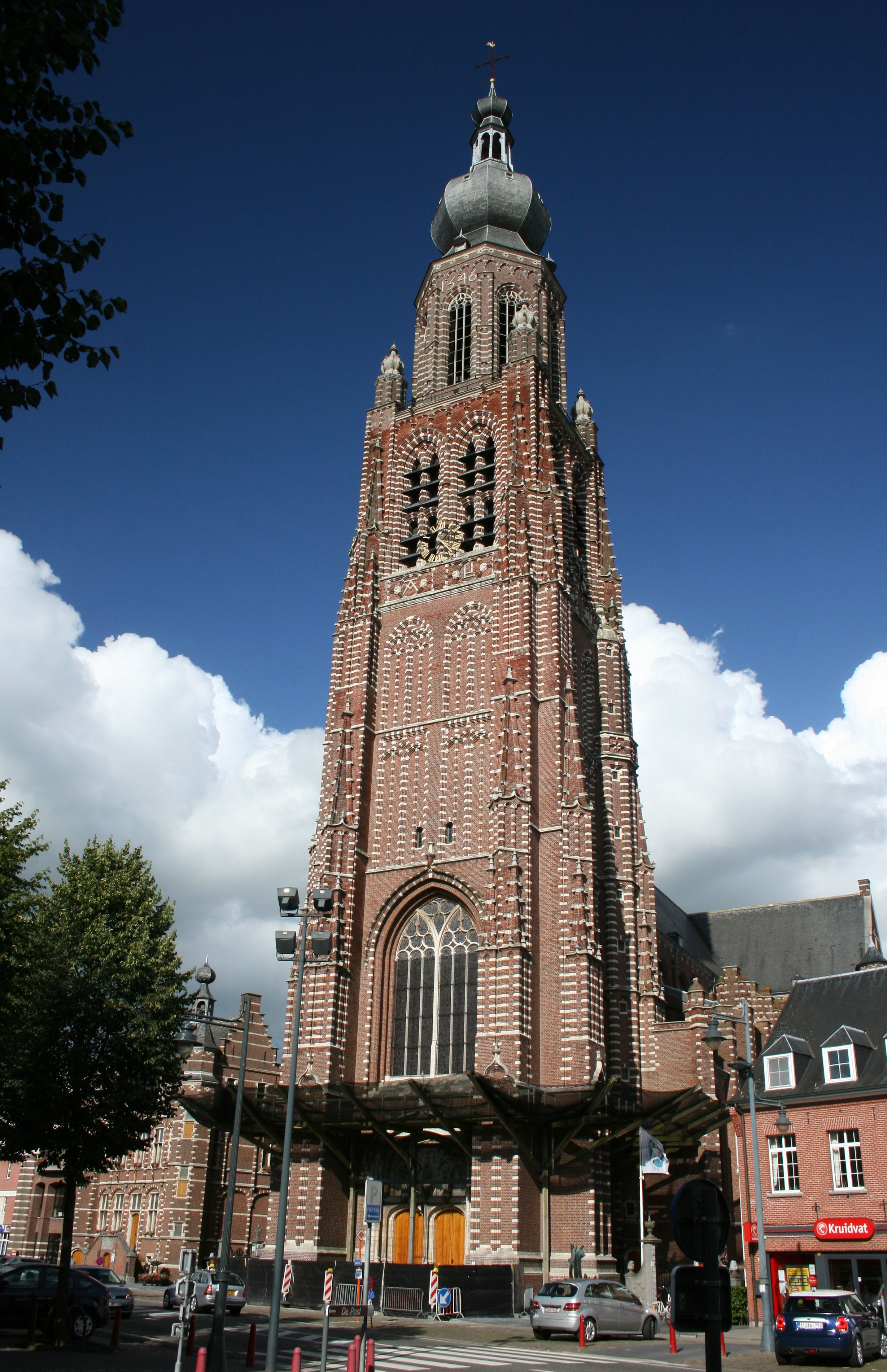 Hoogstraten 2016 - Sankt-Katharinenkirche 03 - Sint-Catharinakerk